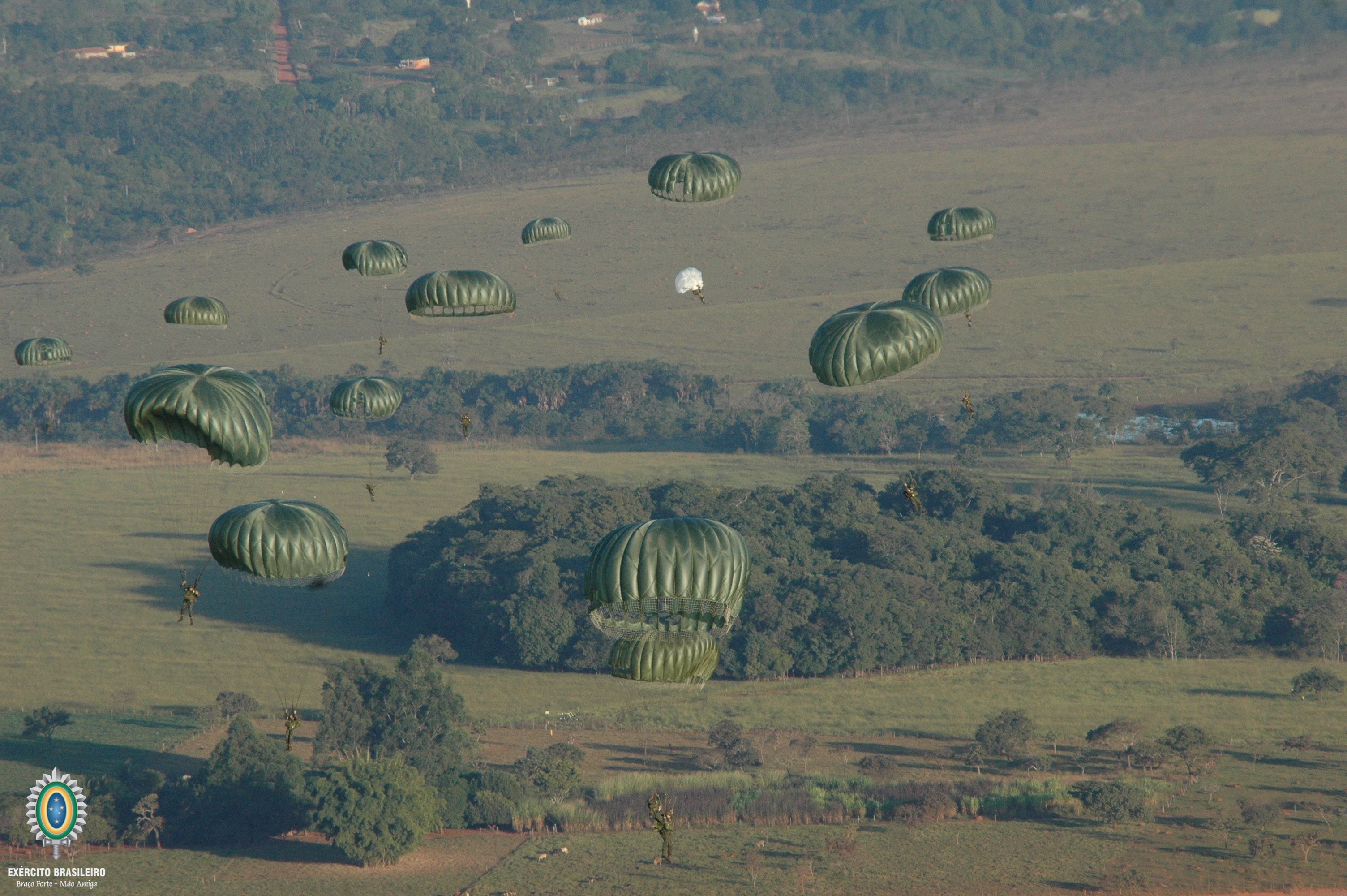 Comandos, Forças Especiais, combatente, Exército, Tiro instintivo caatinga, paraquedistas, atirador, sniper, mergulhadores